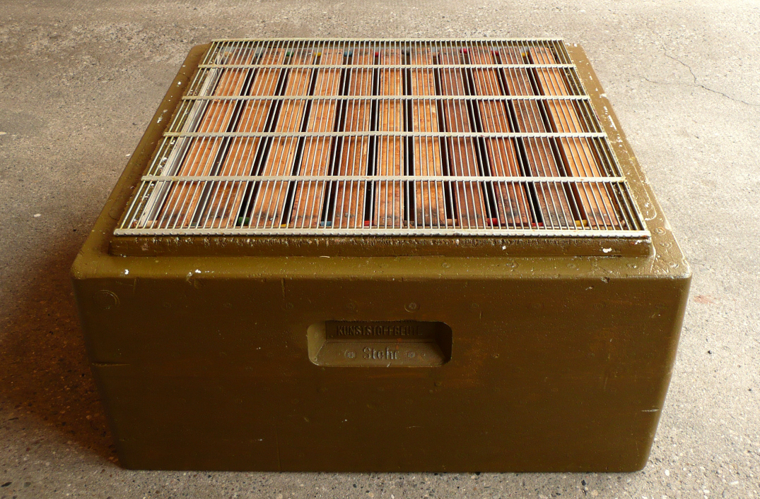 Absperrgitter